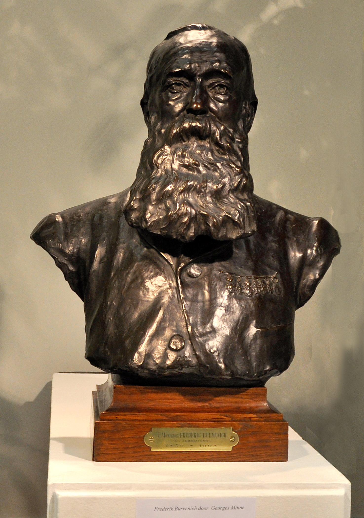 Frederik Burvenich door George Minne, tijdens een tentoonsteling in het Dienstencentrum in Gentbrugge